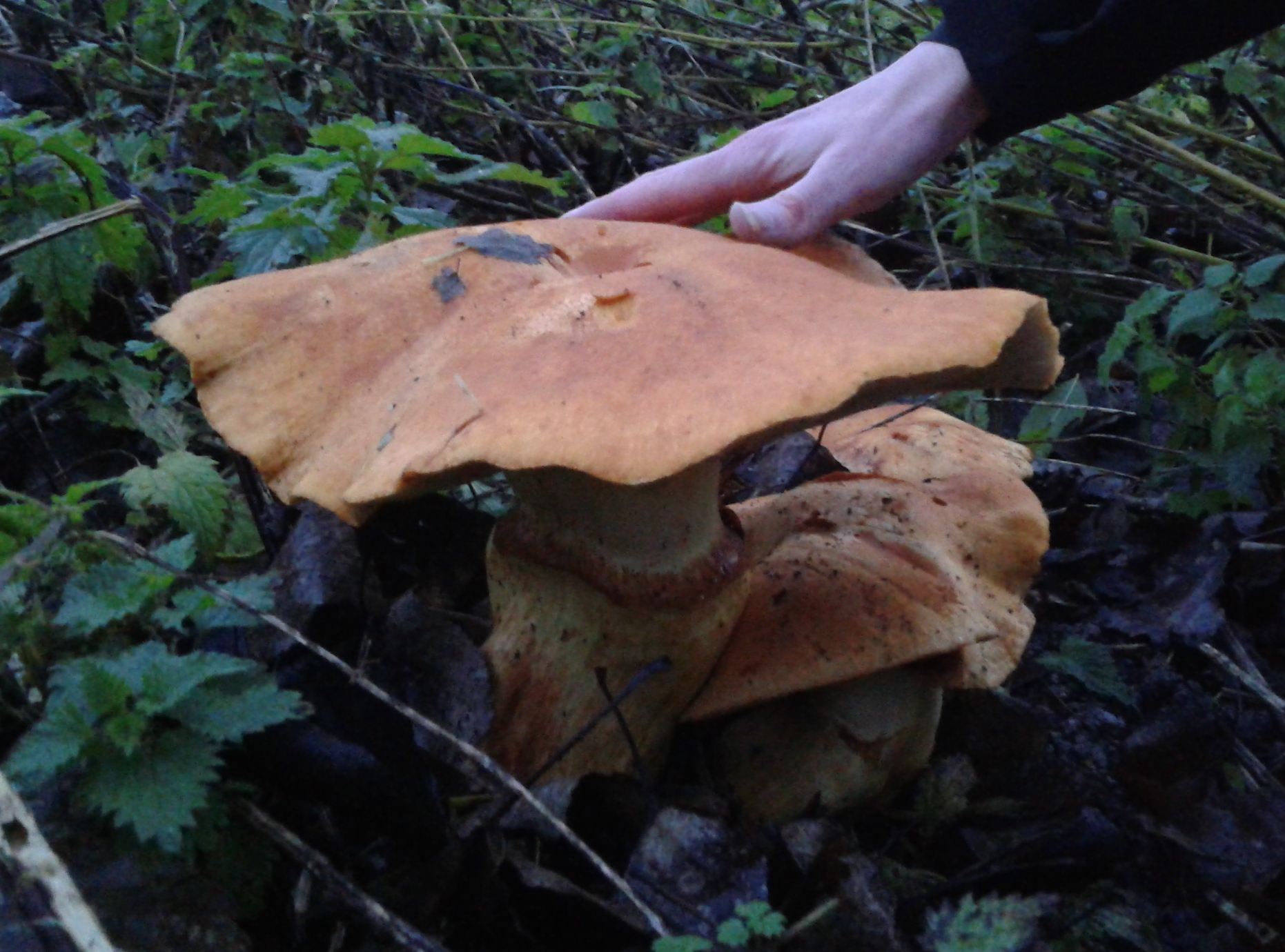 Pholiote remarquable - Pholiota spectabilis ou Gymnopilus junonios